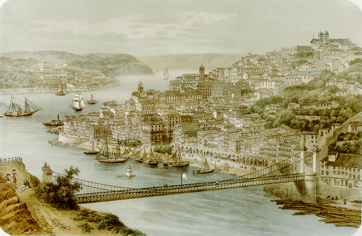 Vue de Porto. Vista do Porto. Paris. L. Turgis J.ne Imp.r r. dês Ecoles et á New York Duane S.t 78. Dessiné et Lithog. par Doroy.